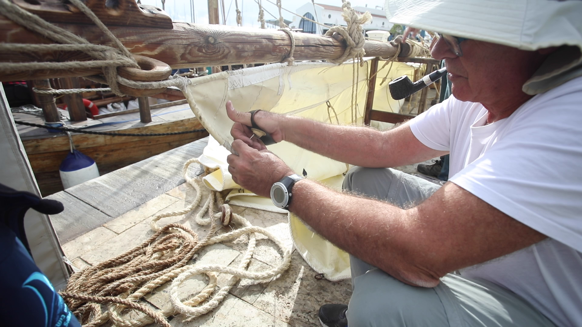 עבודות תחזוקה על המפרש